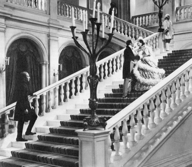 Foto di scena del film Casta Diva (1935), regia di Carmine Gallone. Fonte: Francesco Savio, Ma l'amore no Sonzogno, Milano 1975, pag.69.